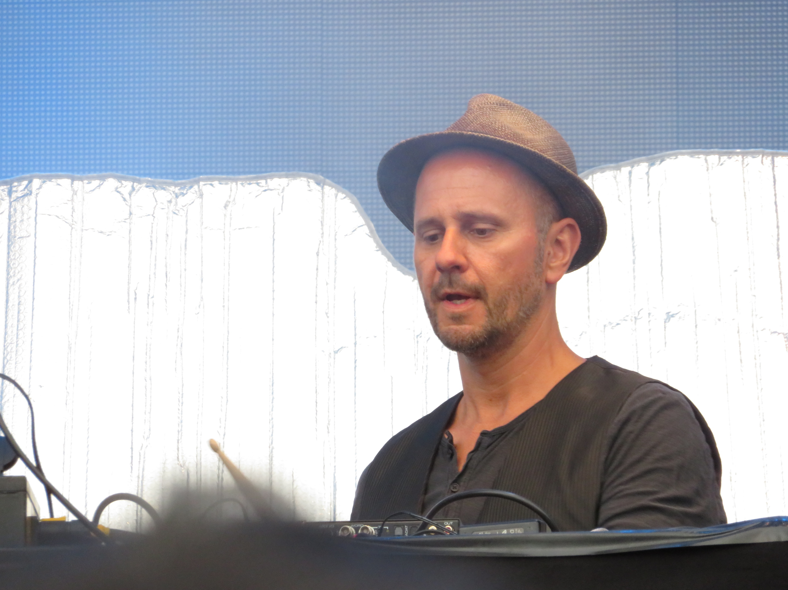 Arno Kammermeier, Booka Shade, Support-Act für Kraftwerk, 2018-07-20, jazzopen 2018, Schlossplatz Stuttgart